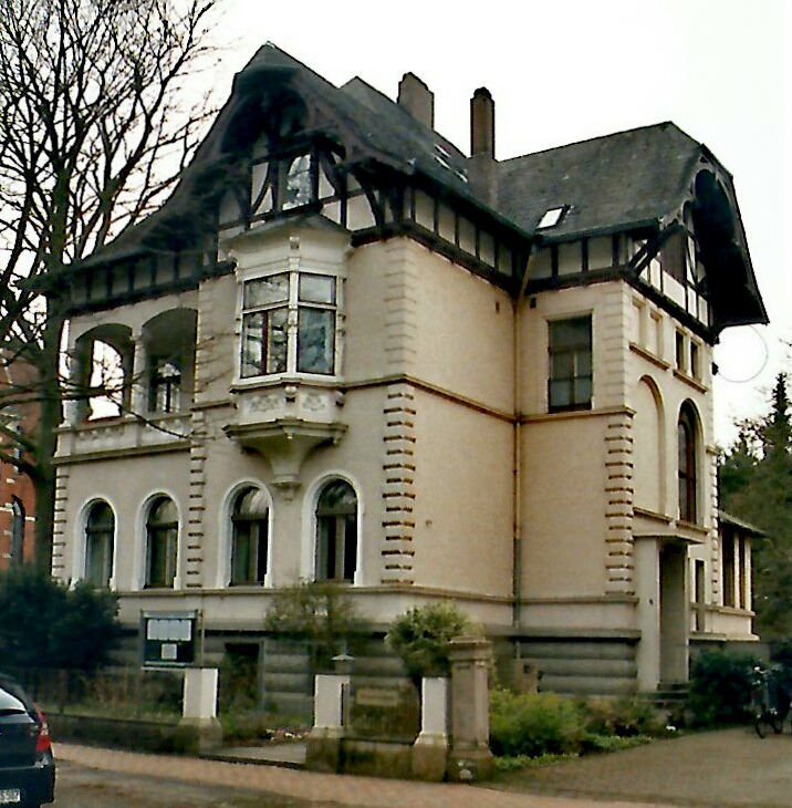 Wohnsitz des ersten Regimentskommandeurs des 3. Hanseatischen Infanterie-Regiments Nr. 162